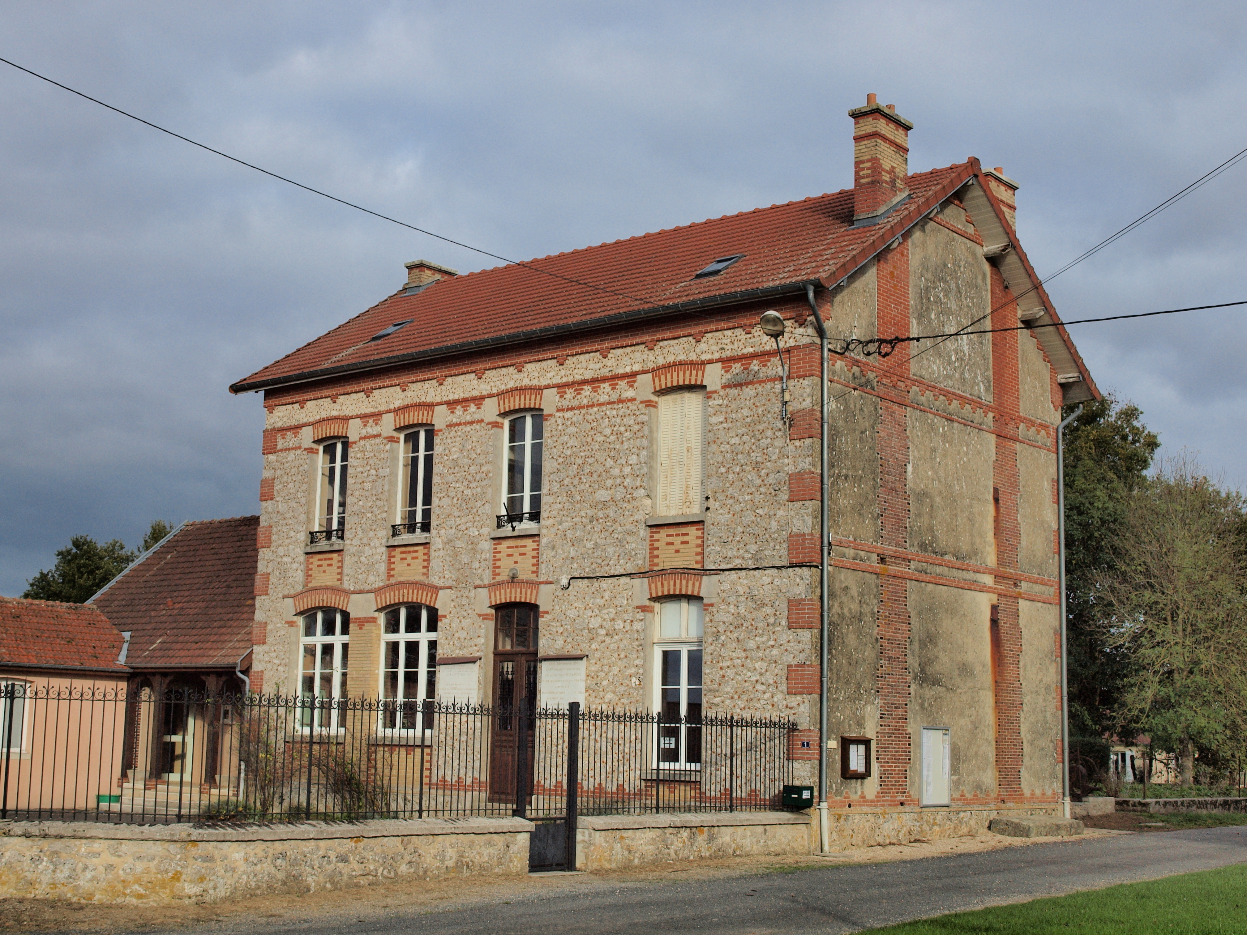 Mairie d'Escardes (Marne, France)